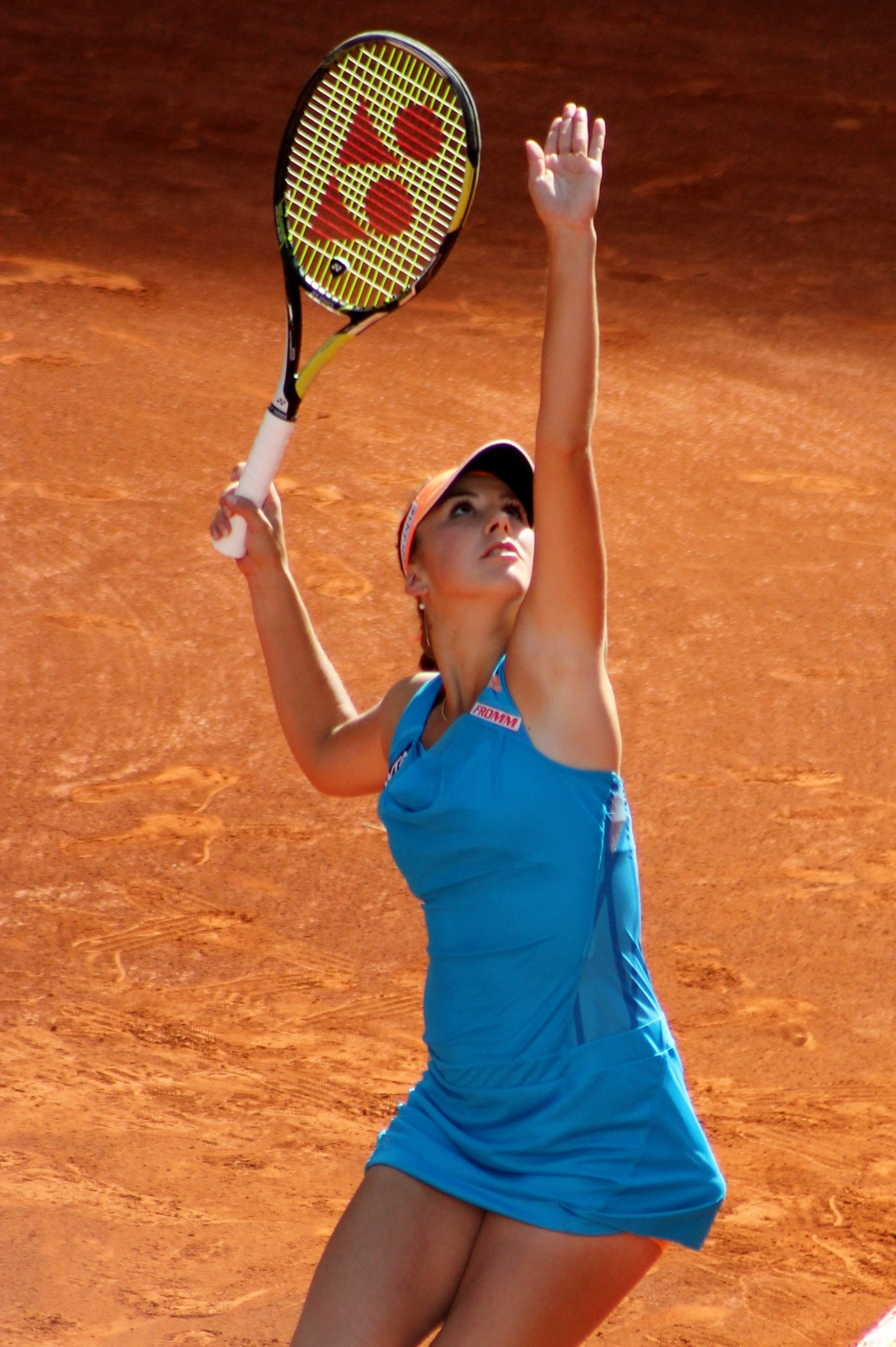 Bencic MA14 (1)